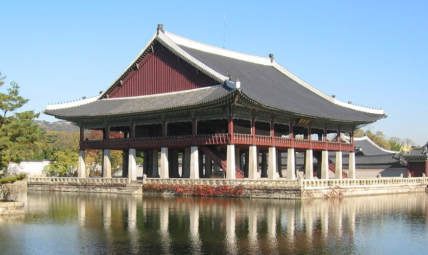 User:Caspian blue (혹은 예전 User:Isageum)이 2006년 11월 15일에 위키백과에 올린 경복궁 경회루 사진을 적당한 크기로 다시 편집하여 올립니다.